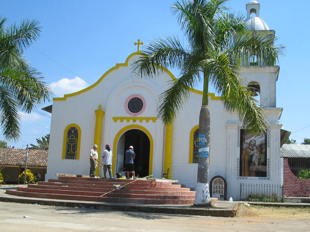 Iglesia de Azacualpa en Chalatenango